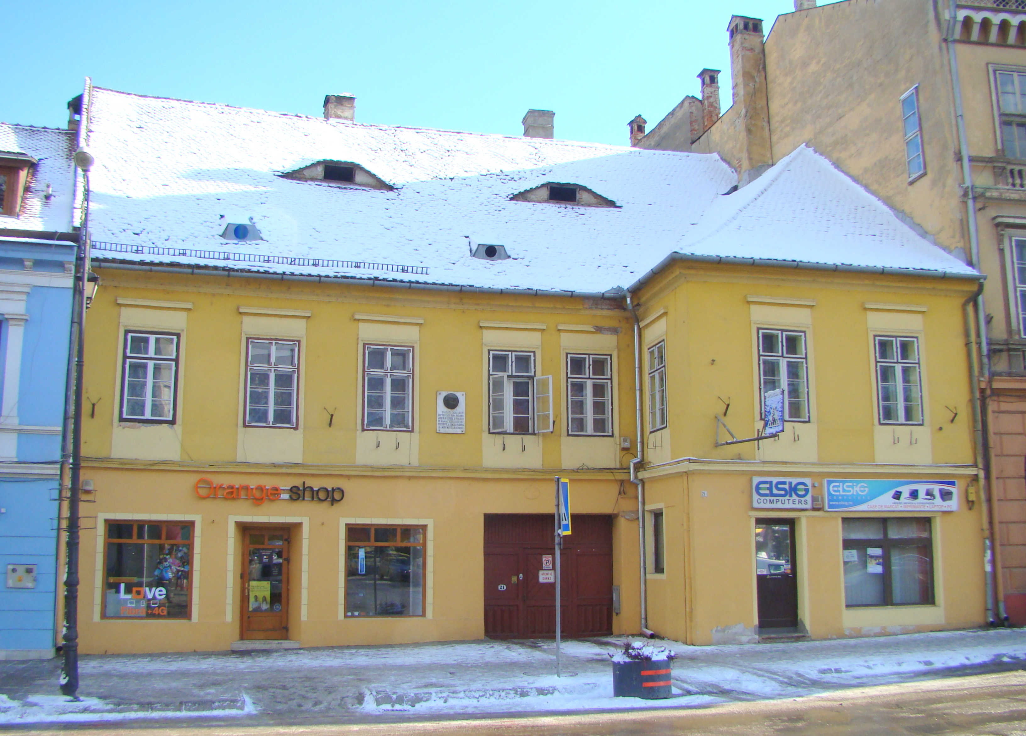 Casă, municipiul Sighișoara, Piața Oberth Hermann 21 1600 - 1650, 1700 - 1750, 1800 - 1850